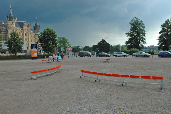 Alter Garten, Schwerin (2005)